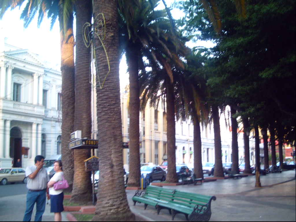 Square Park of Curico, Chile(Plaza de Armas de Curicó, Chile)